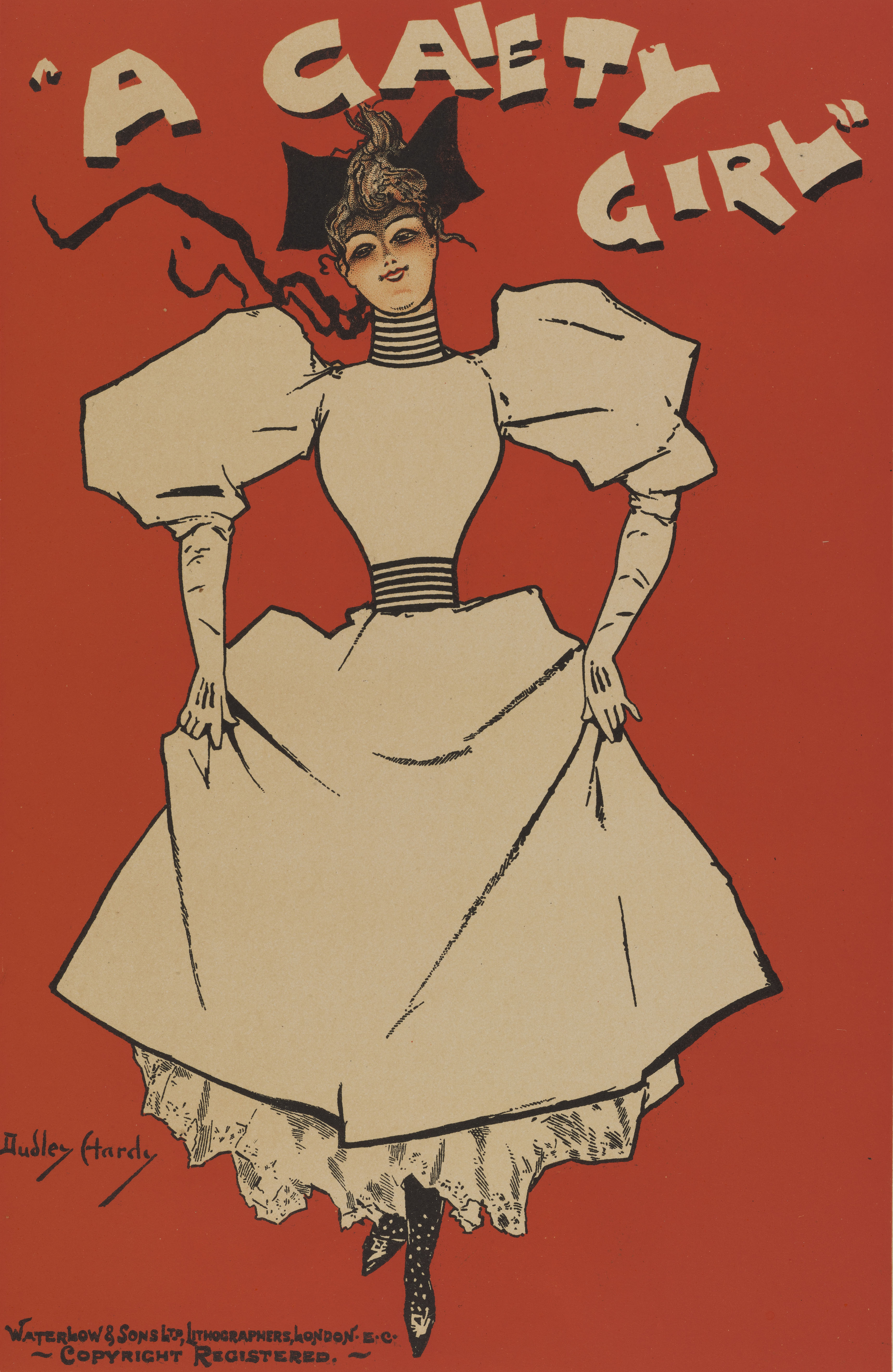 Planche 4 du Les Maîtres de l'Affiche : publication mensuelle contenant la reproduction des plus belles affiches illustrées des grands artistes, français et étrangers, éditée par L'Imprimerie Chaix, Premier Volume, Paris, 1896. 7e Salon des Cent. Au premier plan, Paul Verlaine, très fidèle portrait du poète. Au second plan, M. Jean Moréas.